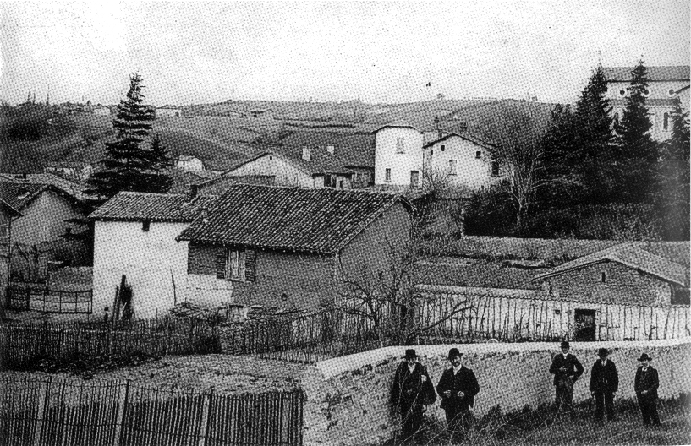 Moidieu-Détourbe en 1925